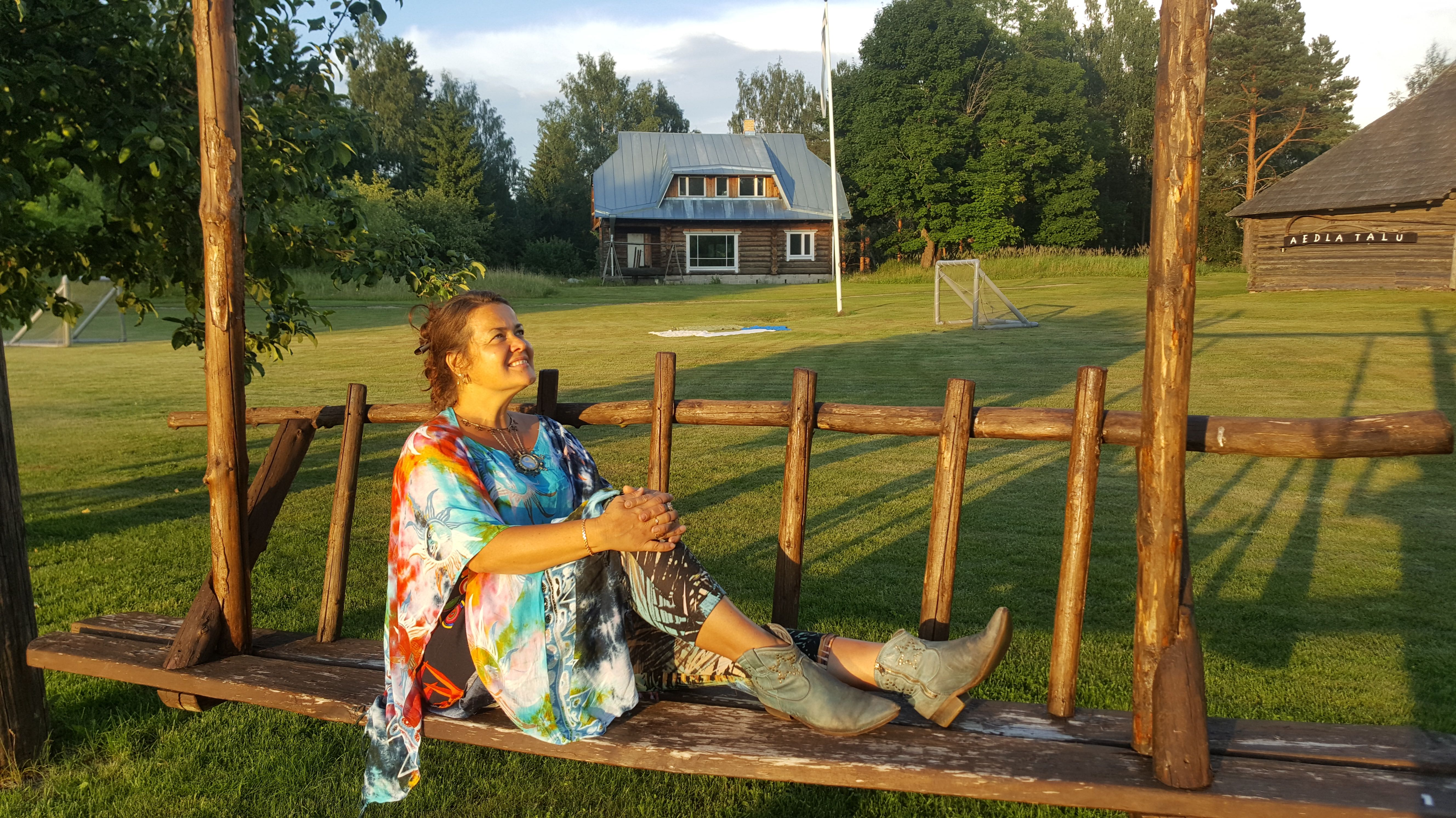 Katrin Aedma, Lõuna Eestis koolitamas. Puhkehetk